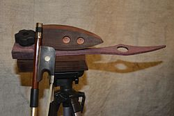 Classificació: Idiòfon Creador: Hans Reichel Creat: 1949-2011